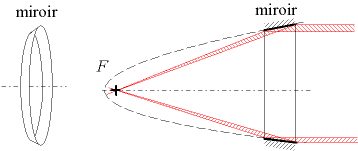 Miroir parabolique pour rayons X : anneau de paraboloïde de révolution. Les rayons X ne subissant de la réflexion que pour des incidences rasantes, il faut utiliser un anneau de paraboloïde, et non une calotte comme pour la lumière. Ce type de miroir équipe les télescopes à rayons X embarqués sur des satellites. Auteur : Christophe Dang Ngoc Chan, réalisé avec un programme de dessin vectoriel Licence GFDL Christophe Dang Ngoc Chan